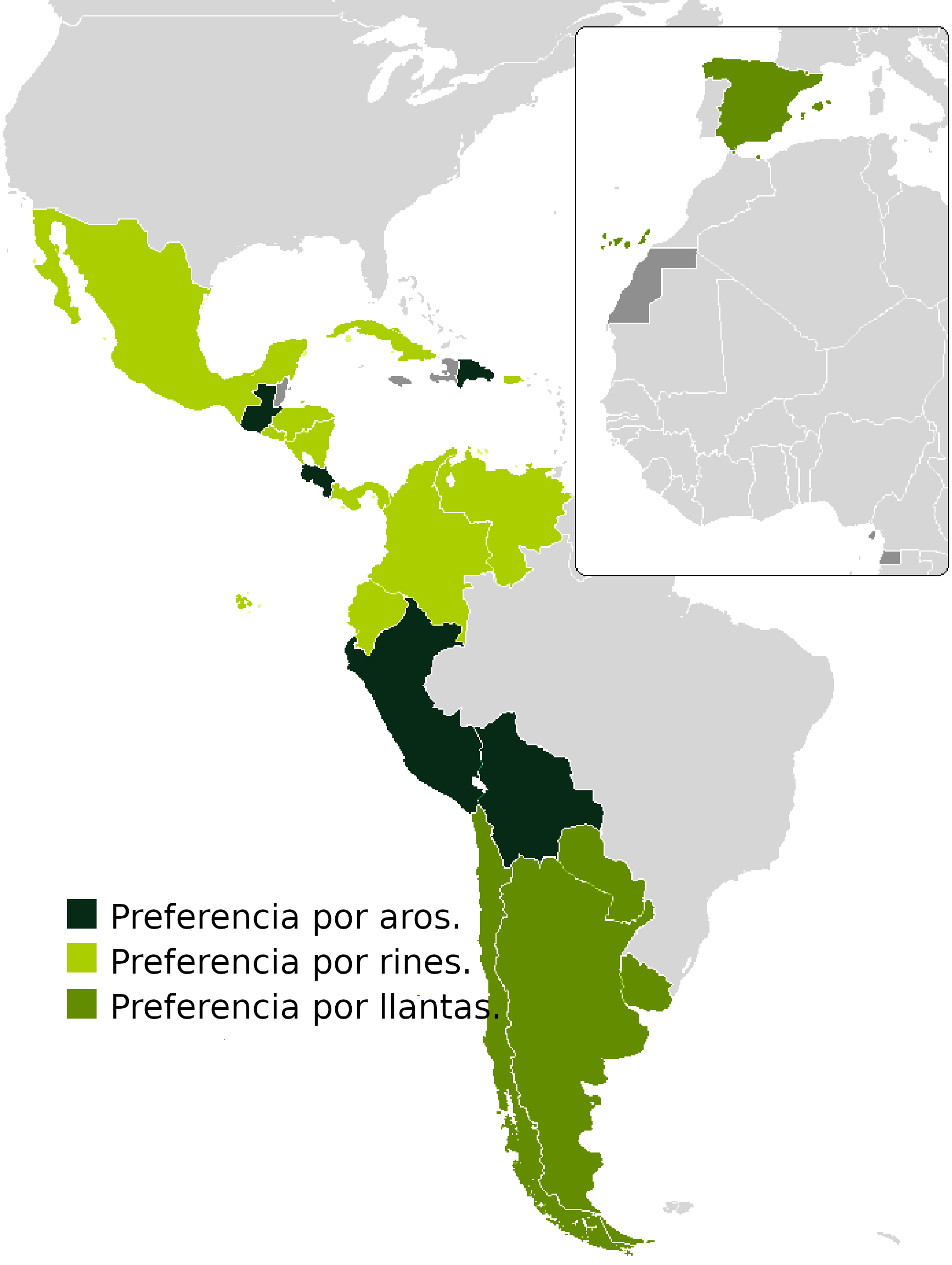 Preferancia por país de las palabras rin, aro y llanta